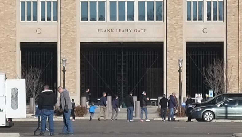 Notre Dame Stadium